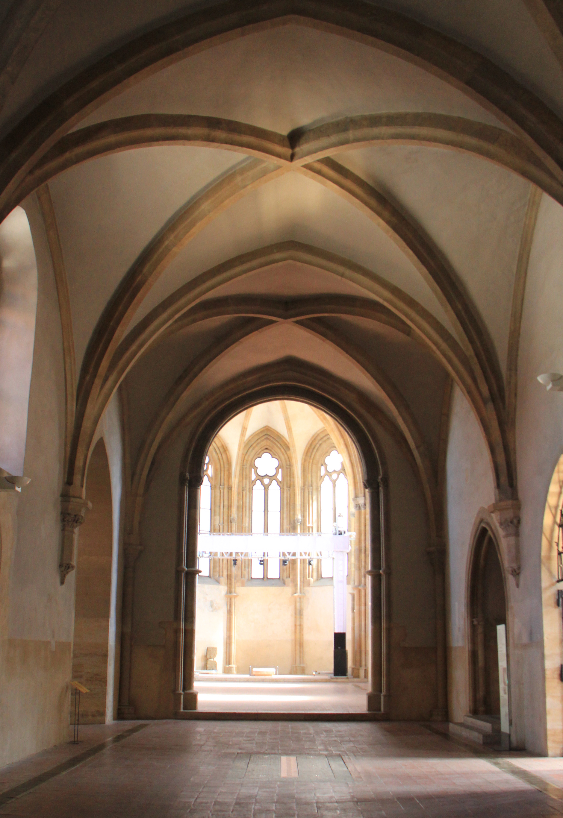 Часовня Девы Марии. Слева находится вход в часовню Анежки, а прям вход в костел Святого Сальвадора